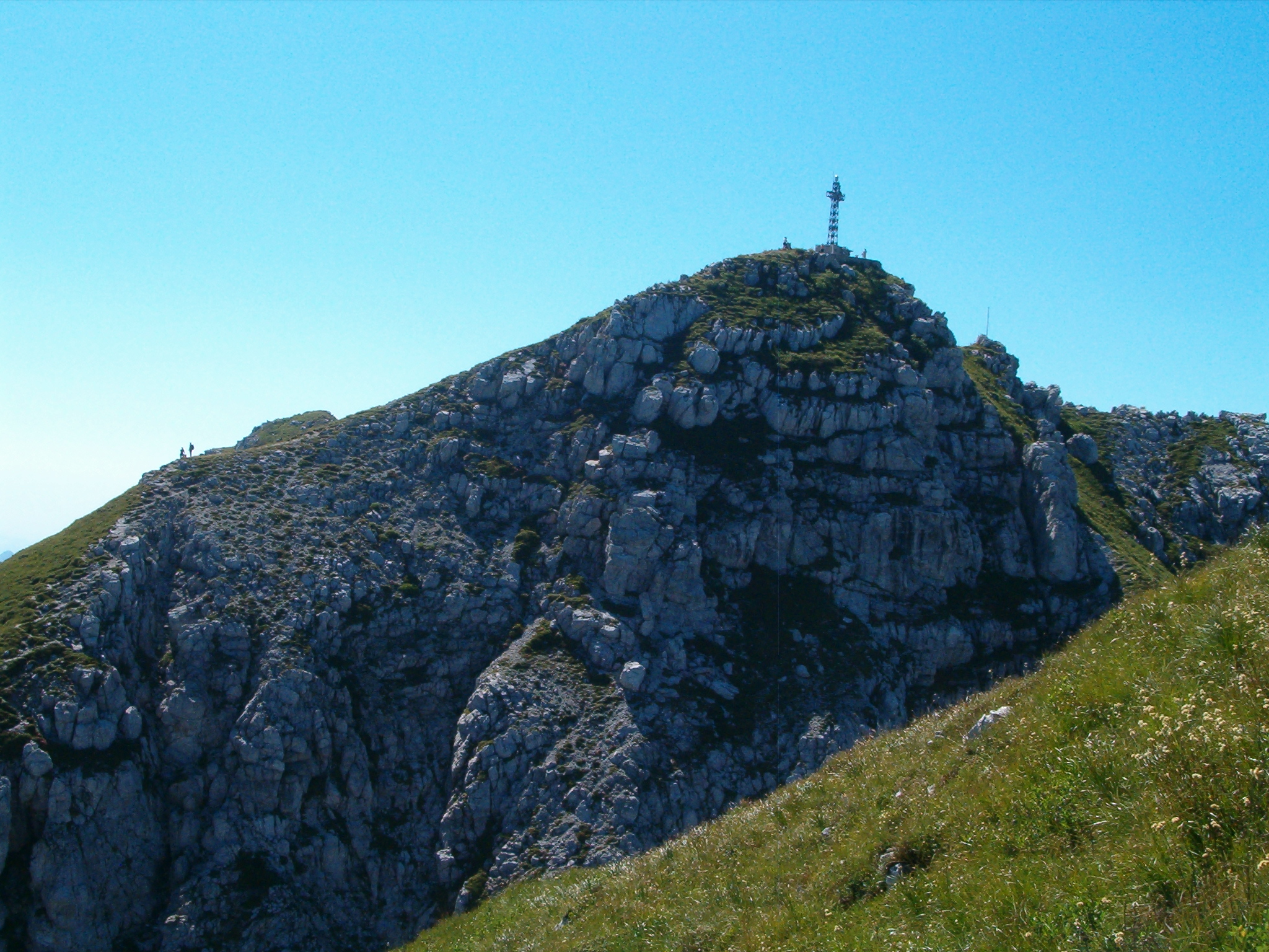 Resegone - Punta Cermenati